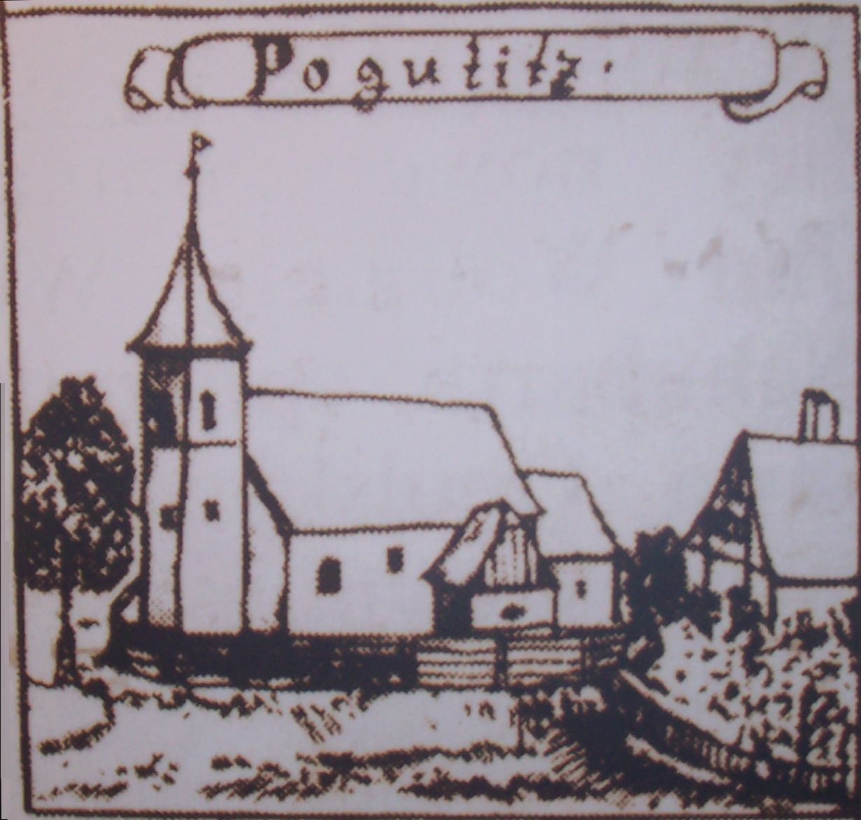 Kościół w Bogucicach, XVII wiek